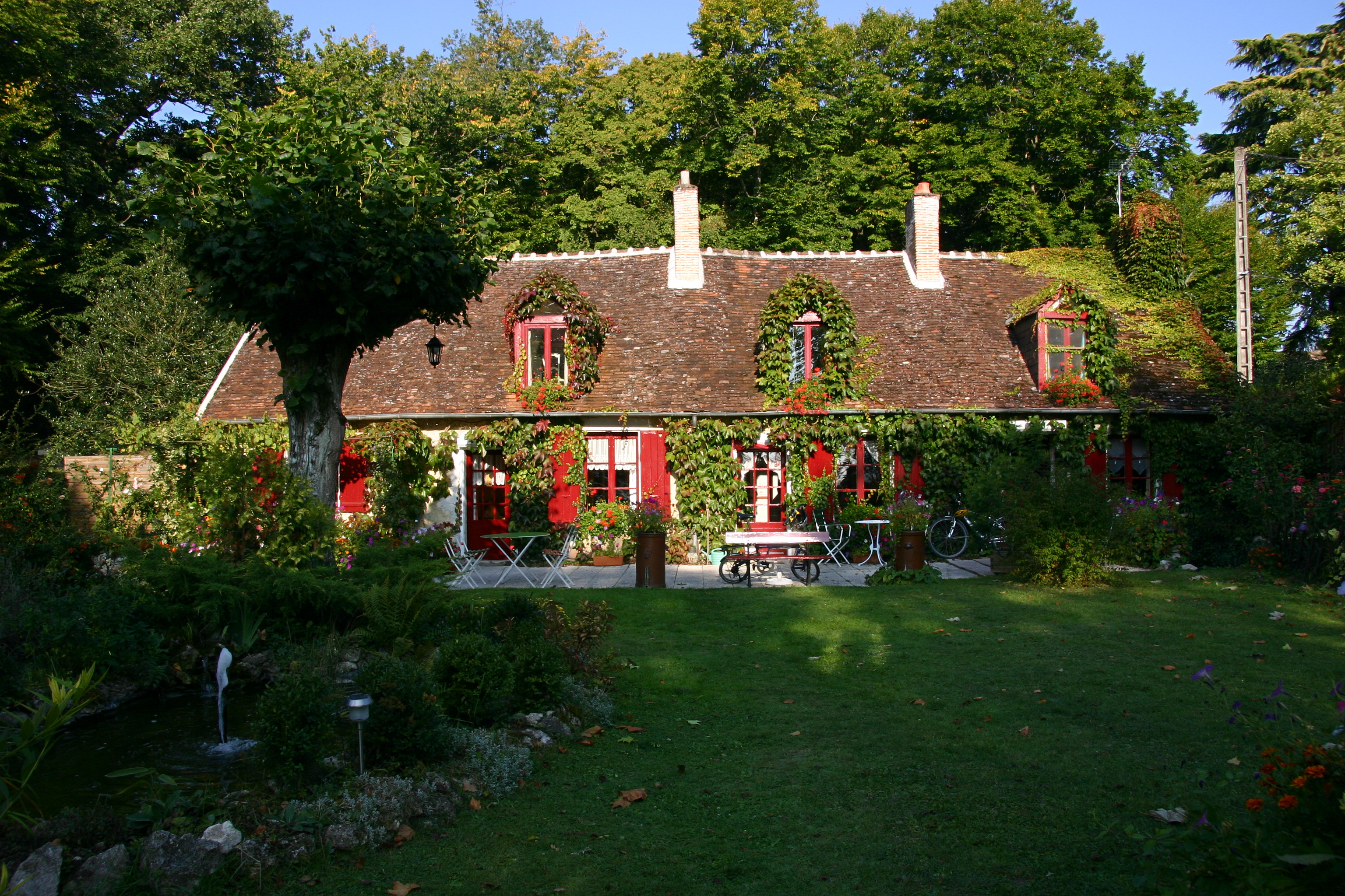 Gästehaus La Flanerie in Cour-Cheverny